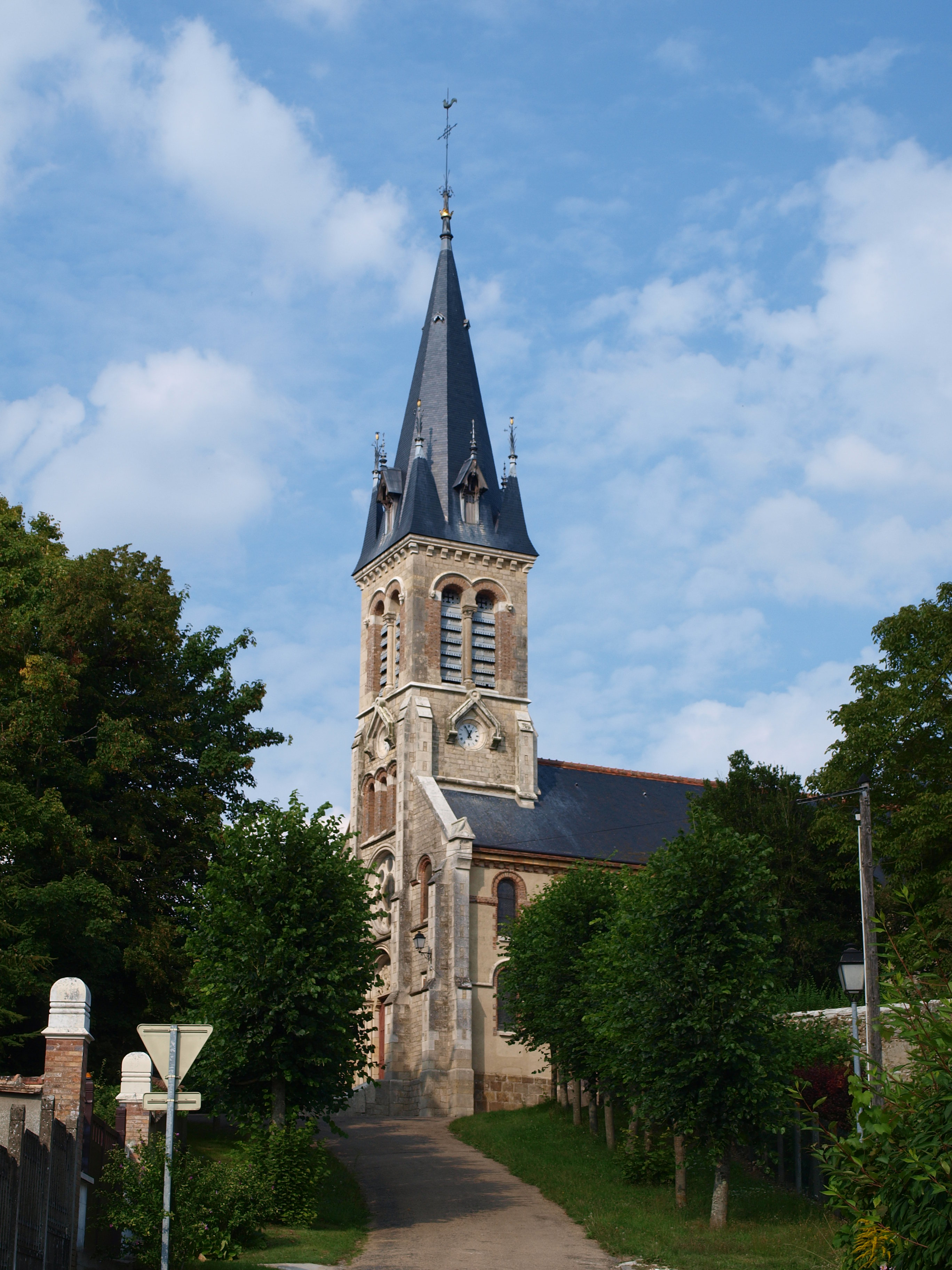 Vallery (Yonne, France) ; église